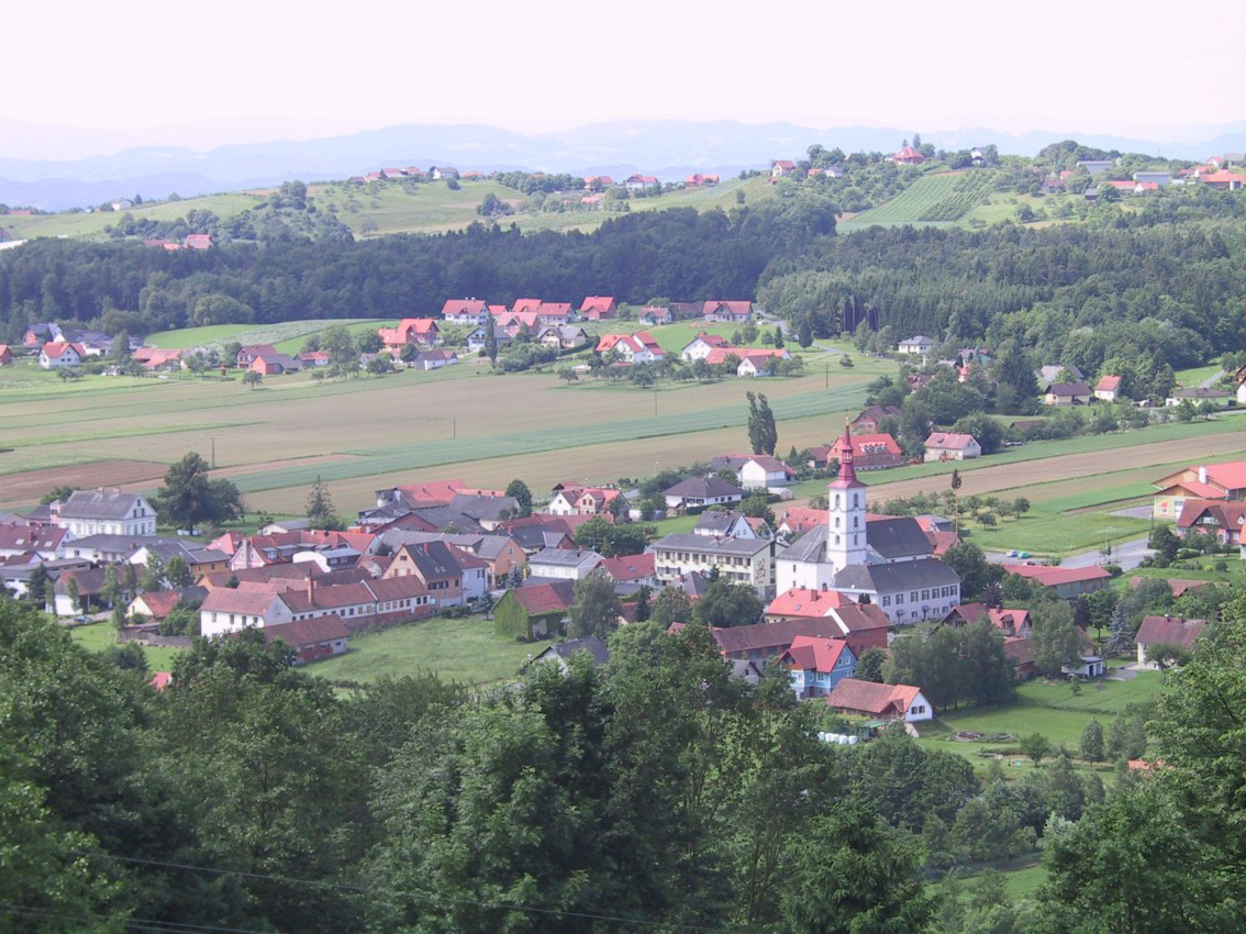 Ansicht auf St. Peter am Ottersbach. vermutlich